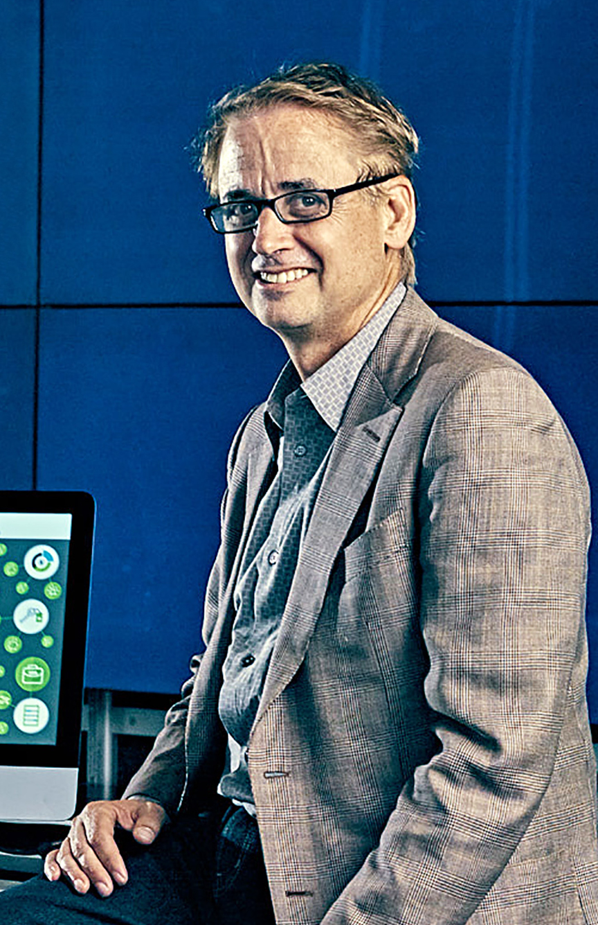 David Kenny, vicepresidente sénior de IBM Watson & Plataforma Cloud.